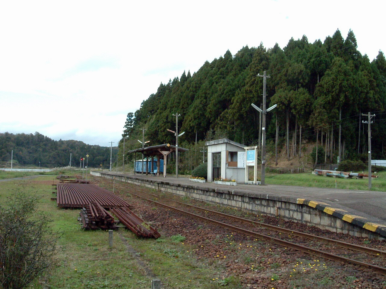 のと鉄道能登線甲駅構内